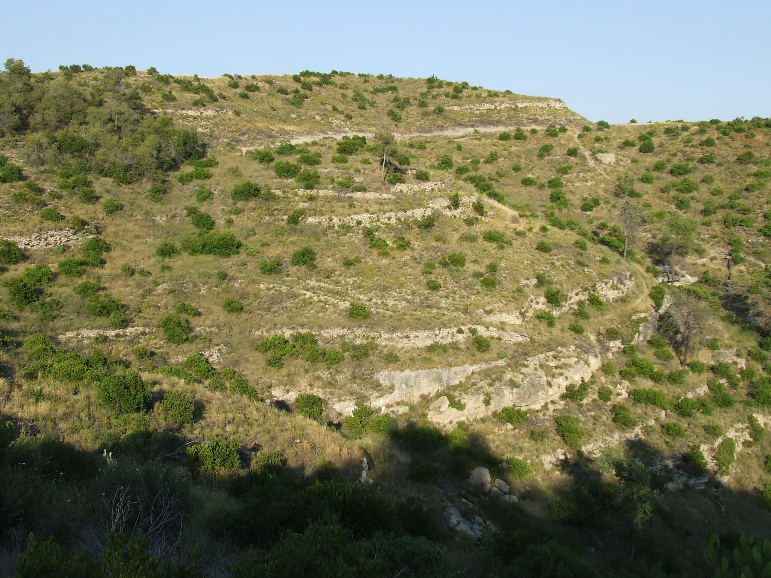 Detall de la Vinya Vella de Mussarra